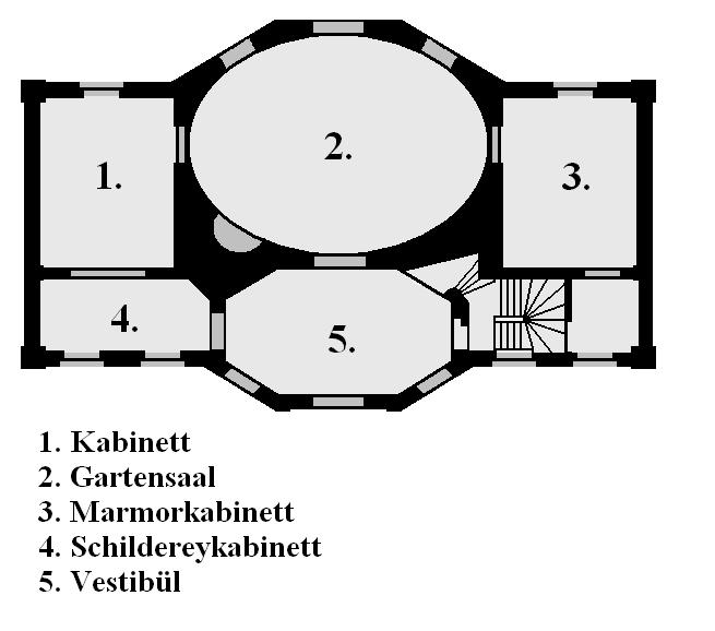 Grundriss Prinzenhaus Plön / Kernbau